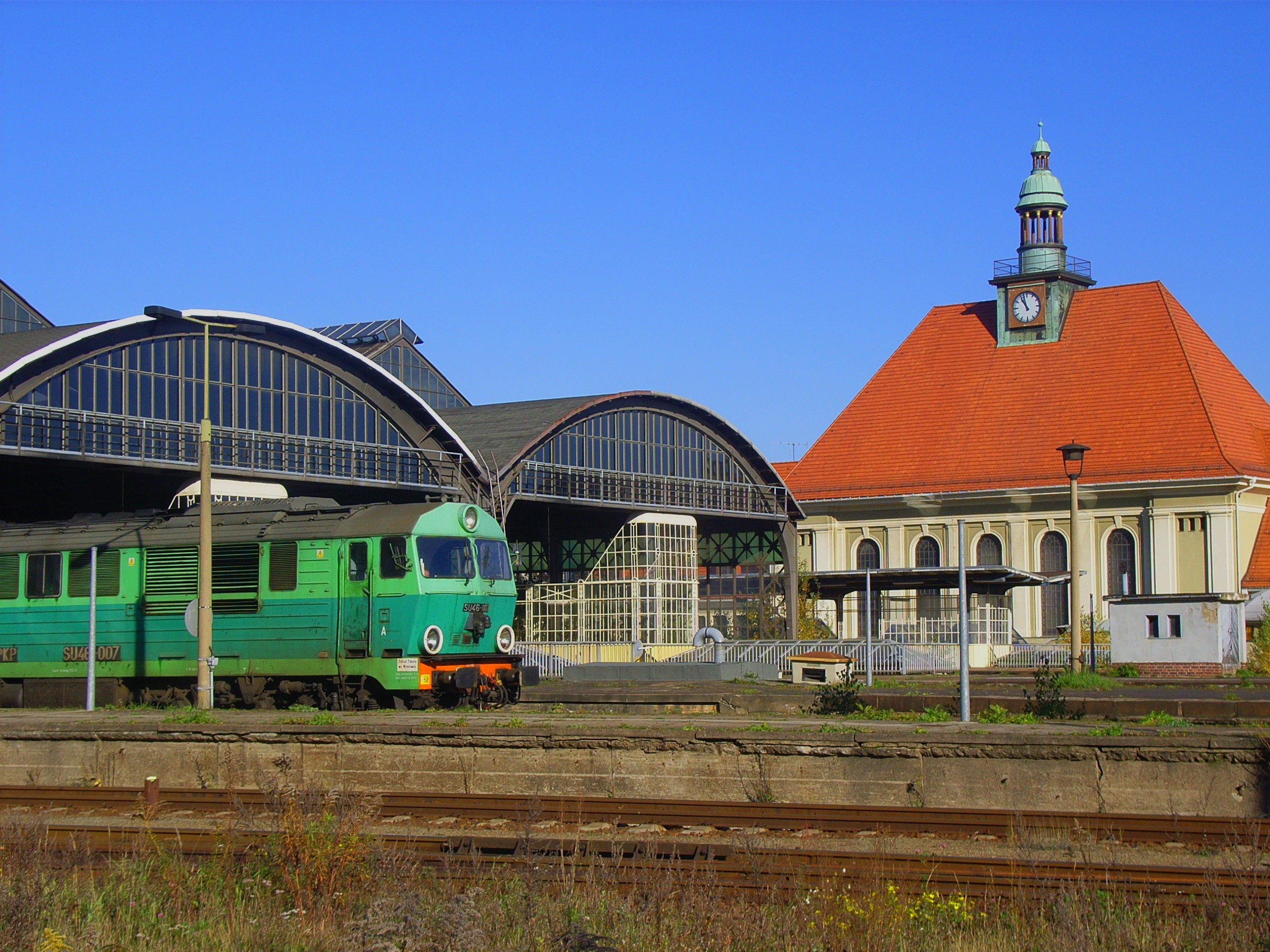 Bahnhof Görlitz aus Richtung Süden, mit SU46 der PKP